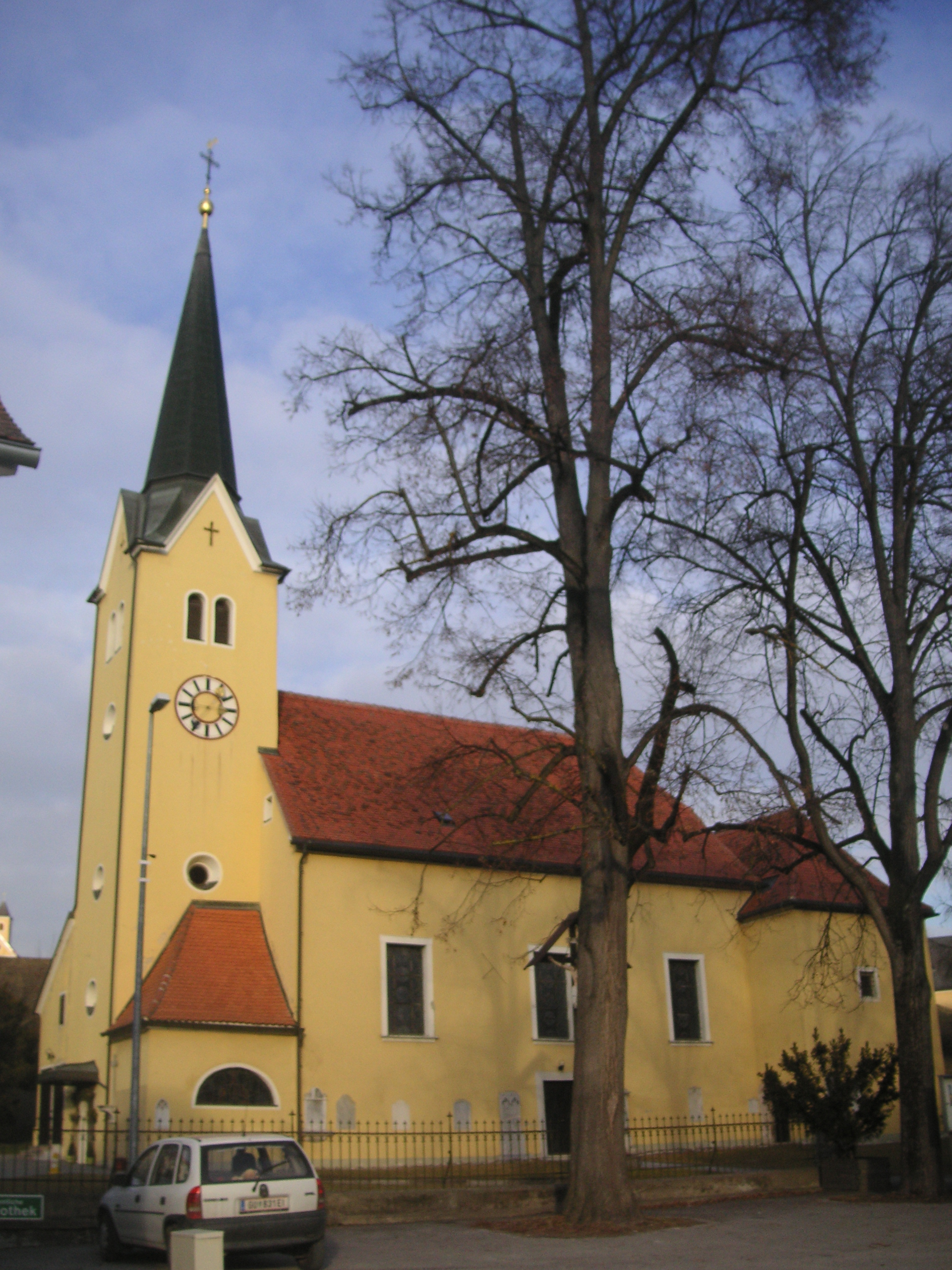 Kath. Pfarrkirche hl. Stephan und Kirchhof mit Umfassung und Friedhofskreuz